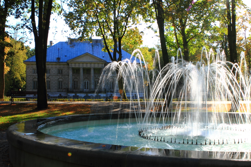 Pałac w Młochowie i fontanna jesienią